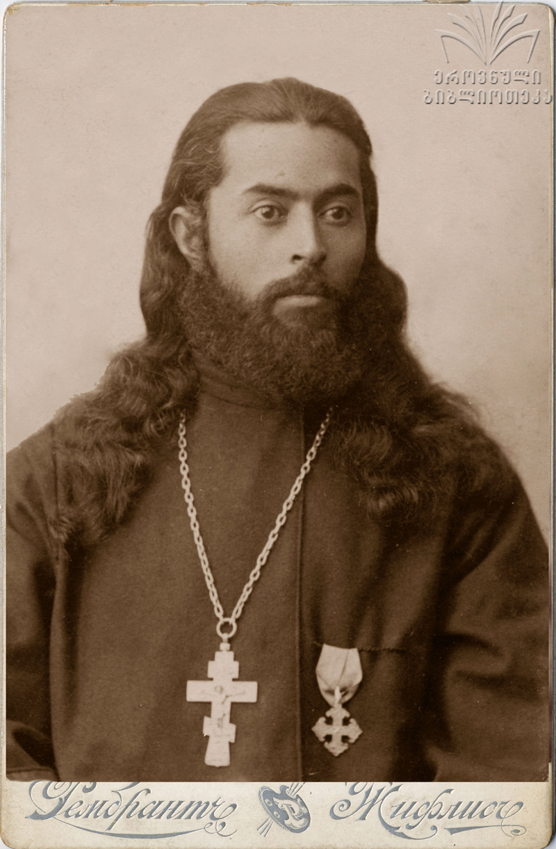 Тарас Иваницкий, священник Грузинской православной церкви, младший брат Рафаила Александровича Иваницкого-Ингило (груз. რაფიელ ინგილო-ივანიცკი, 23 июля 1886—27 июня 1966) — грузинского юриста, публициста, священнослужителя.